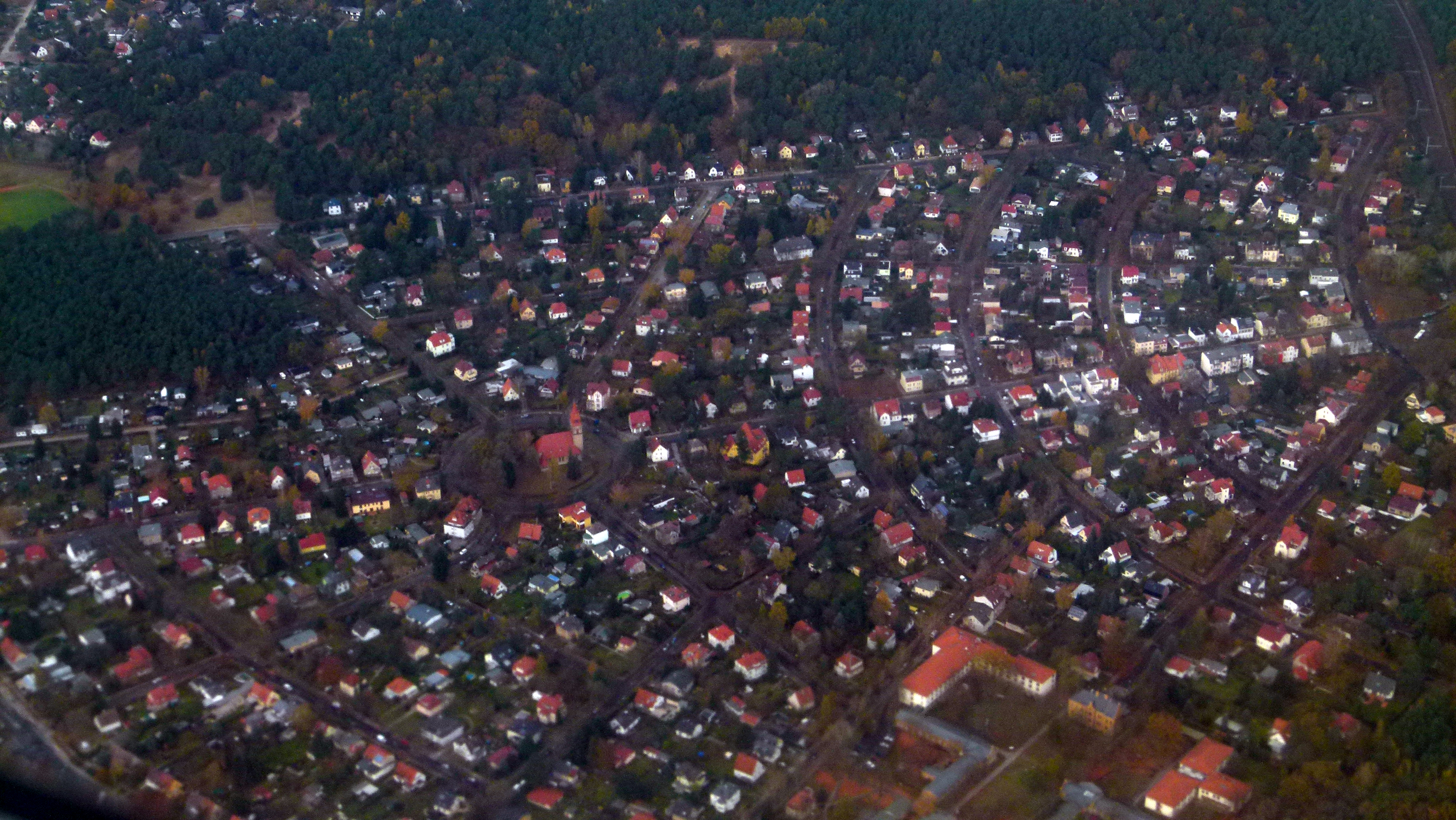 Blick auf Wilhelmshagen